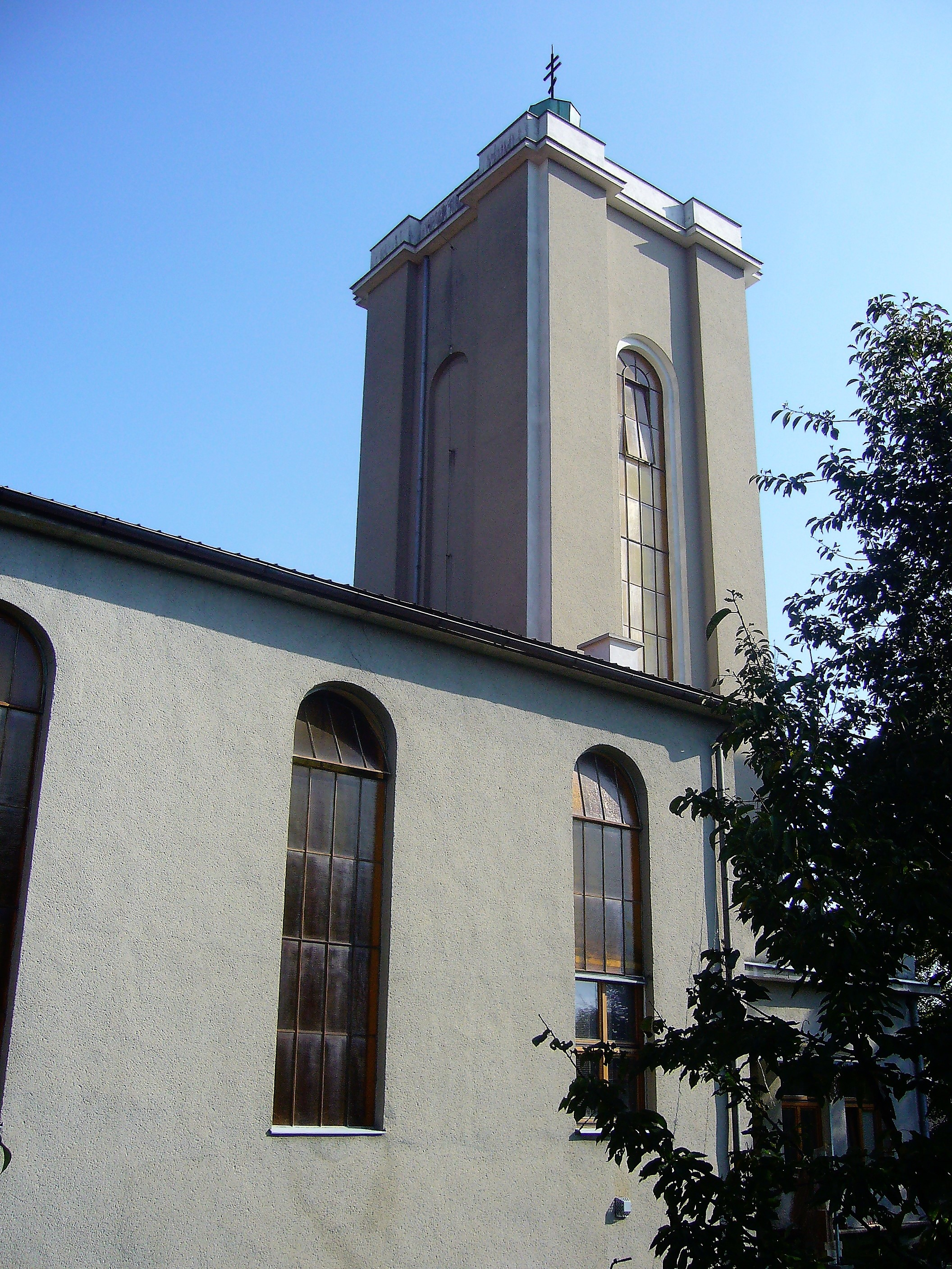 kostel v roce 2017